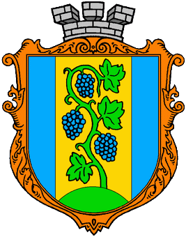 Герб смт Підбуж